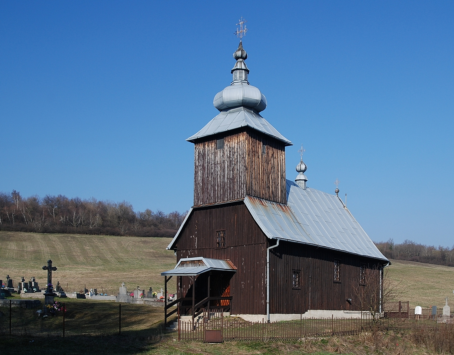 wieś Hutka